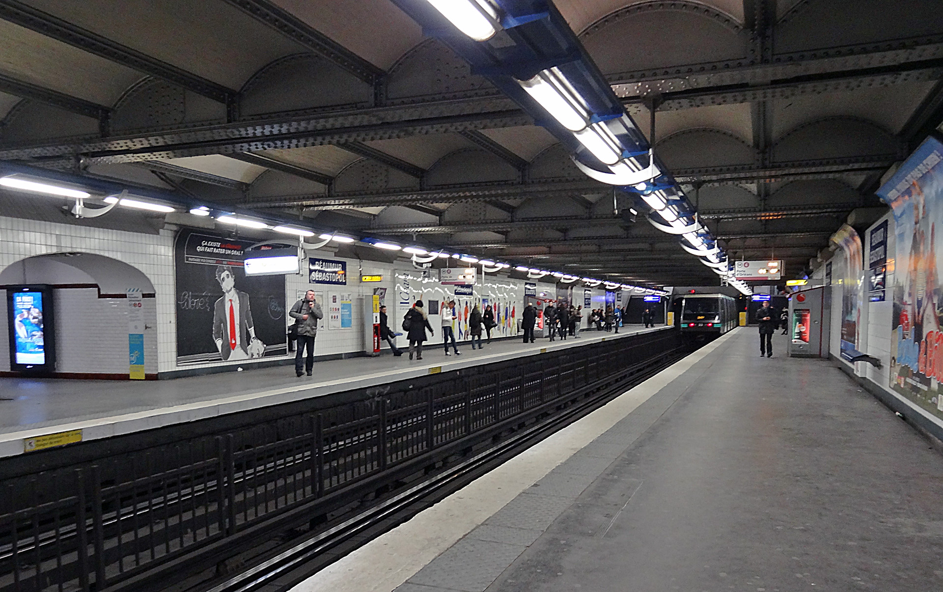 Station Réaumur - Sébastopol de la ligne 4 du métro de Paris, France.